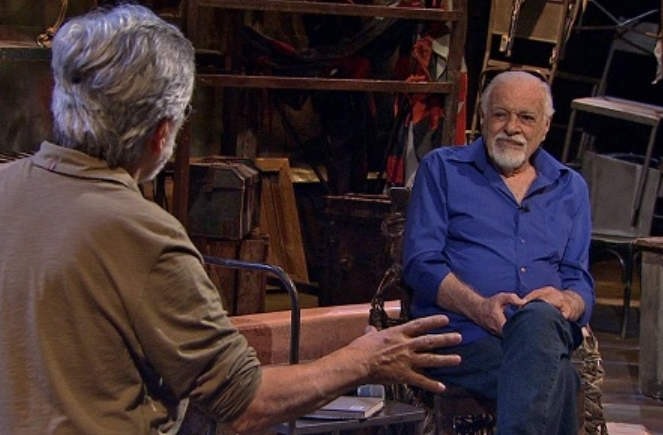 O apresentador e diretor teatral Aderbal Freire Filho entrevista no cantor e compositor Sérgio Ricardo, ambos brasileiros, na TV Brasil.